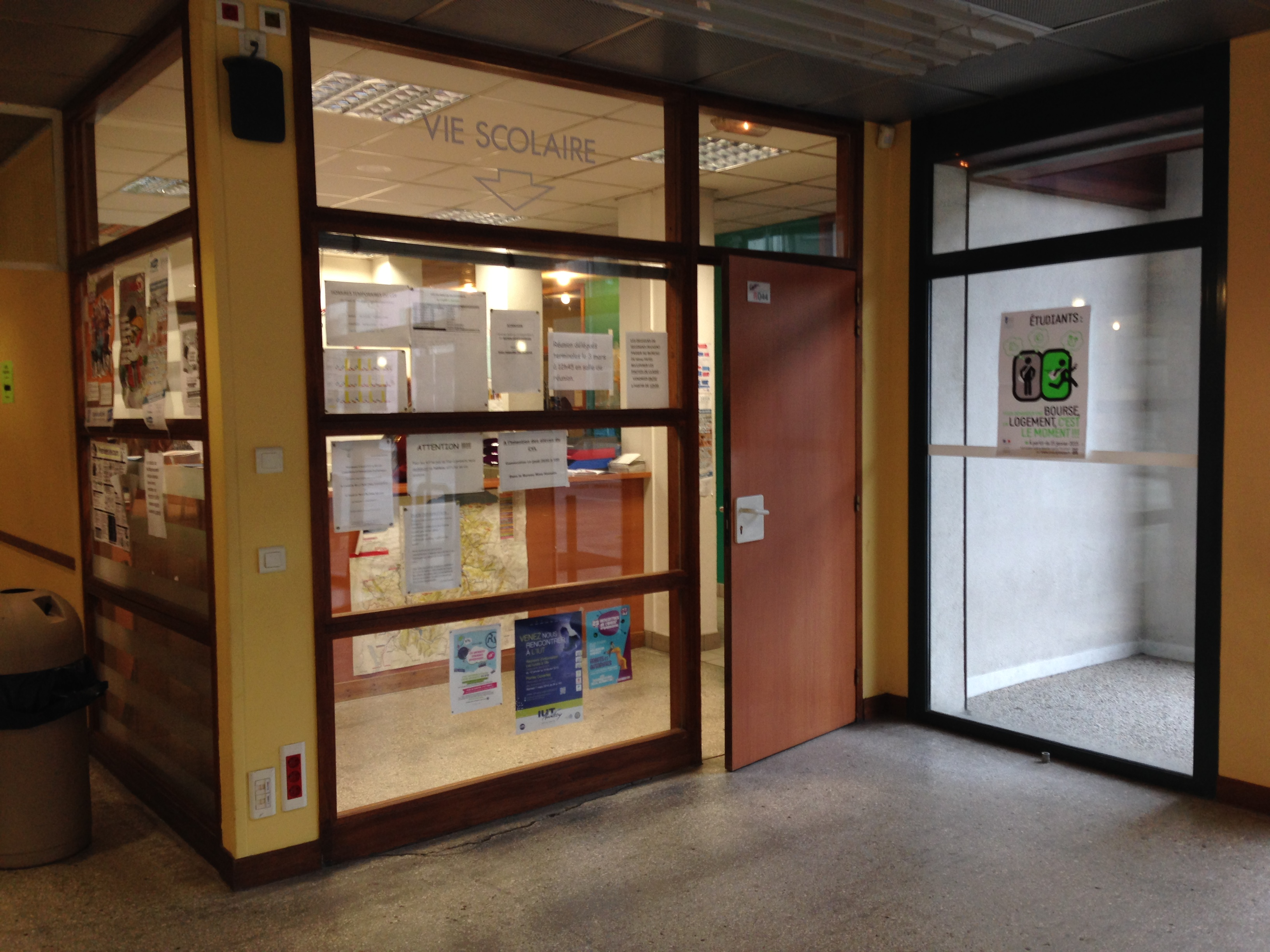 Ceci est une photo de la vie scolaire du Lycée Gabriel Fauré d'Annecy